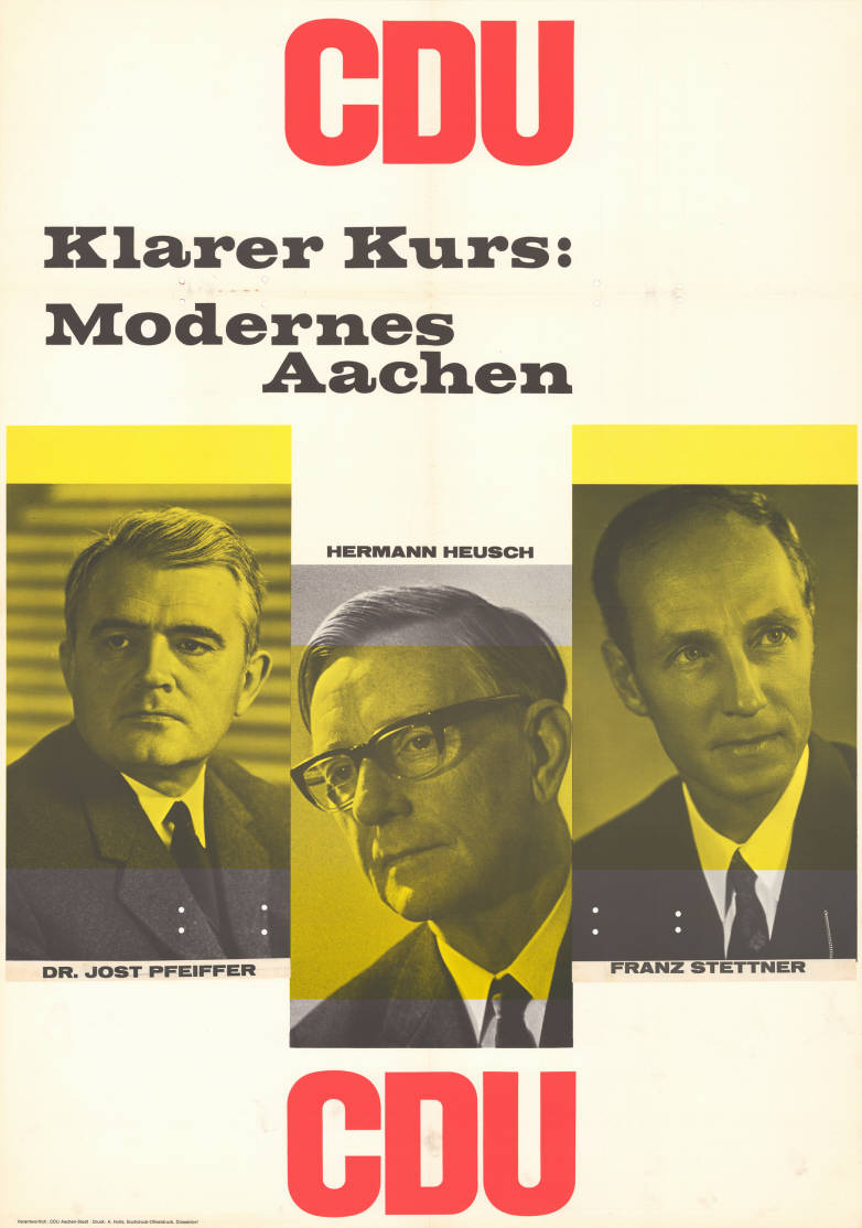 CDU Klarer Kurs: Modernes Aachen Dr. Jost Pfeifer Hermann Heusch Franz Stettner CDUPlakatart:Kandidaten-/Personenplakat mit PorträtAuftraggeber:Verantw.: CDU Aachen-StadtDrucker_Druckart_Druckort:A. Holle, Buchdruck-Offsetdruck, DüsseldorfObjekt-Signatur:10-009 : 641Bestand:Landtagswahlplakate Nordrhein-Westfalen (10-009)GliederungBestand10-18:Landtagswahlplakate Nordrhein-Westfalen (10-009) » CDULizenz:KAS/ACDP 10-009 : 641 CC-BY-SA 3.0 DE